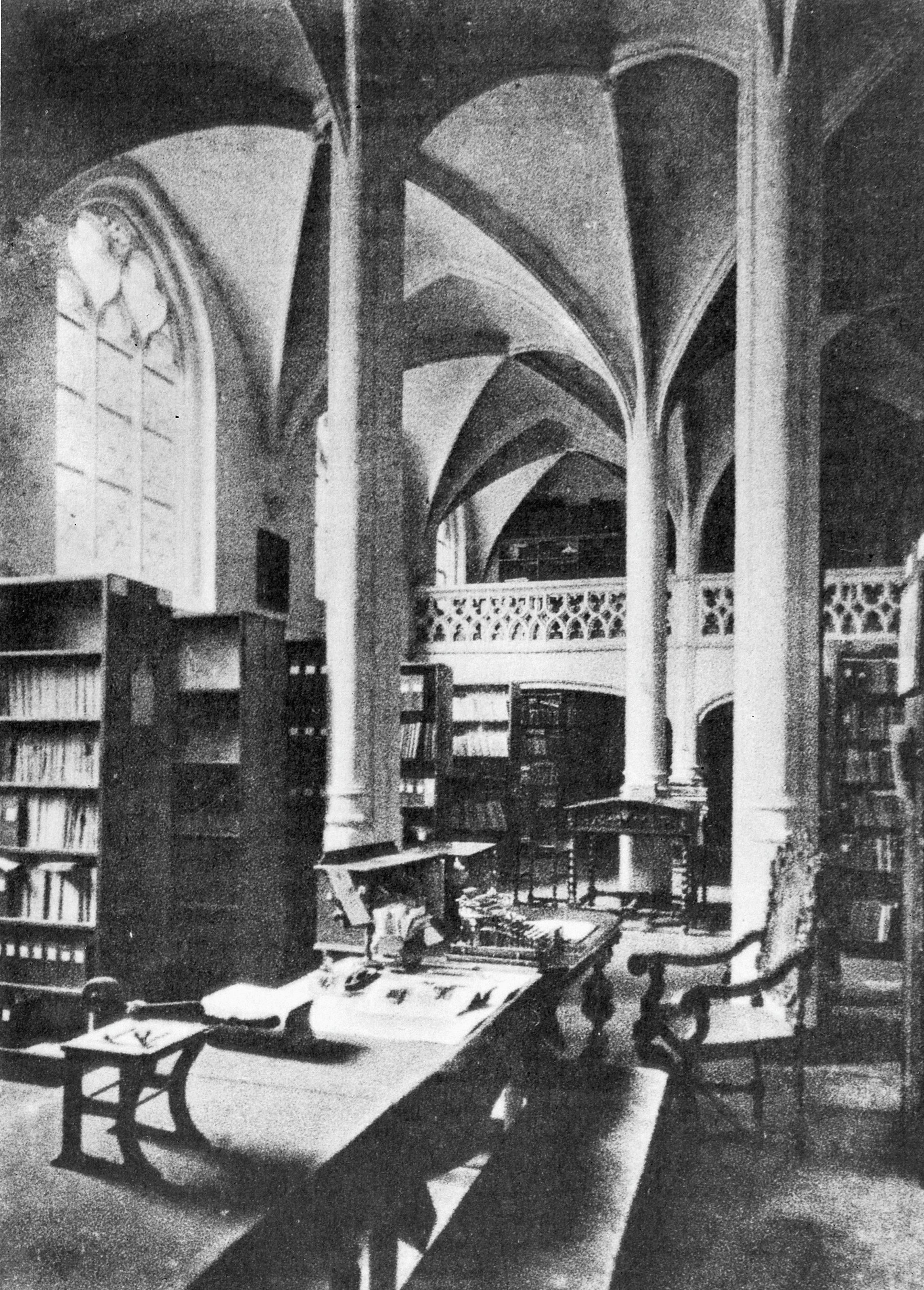 Hotel de Nassau: Reproductie van foto van interieur van de voormalige kapel (opmerking: Uit: Roest v. Limburg, Nassausche Paleizen in België in Onze Kunst)